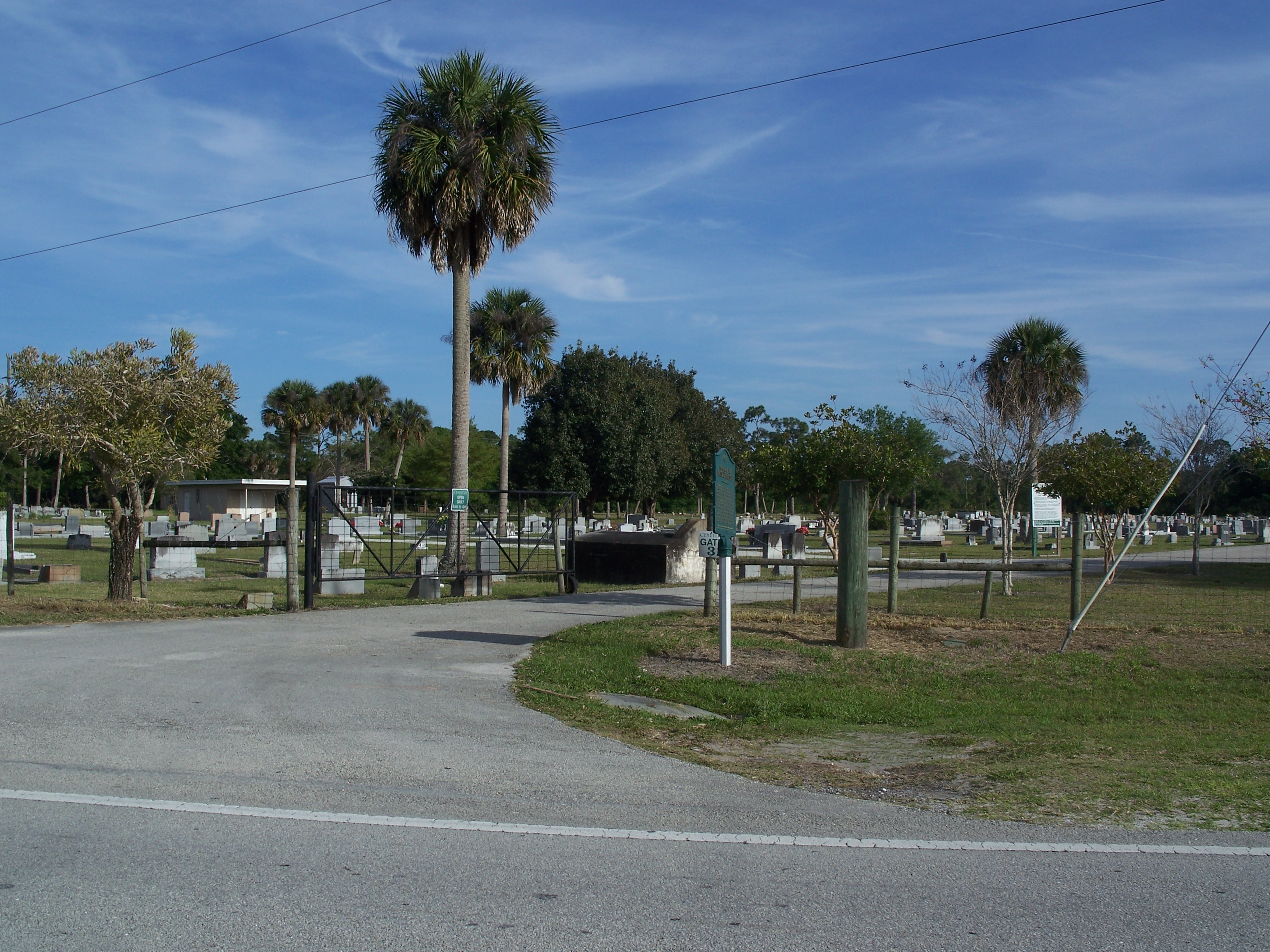 Port Mayaca, Florida: Cemetery